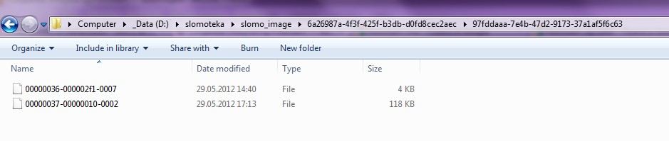 Пример именования файла, созданного в хранилище Filestream